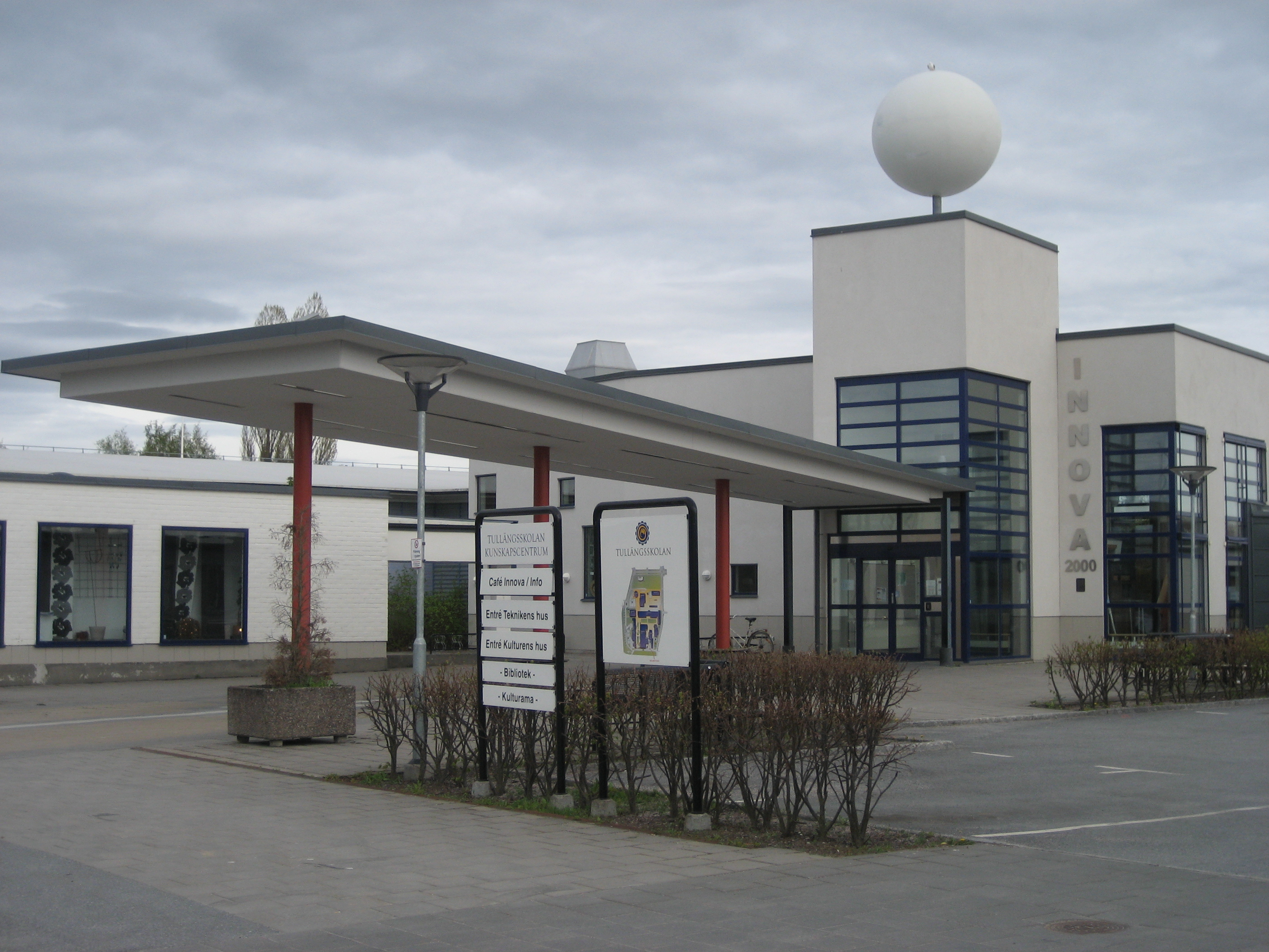 Tullängsskolan of Örebro, Sweden